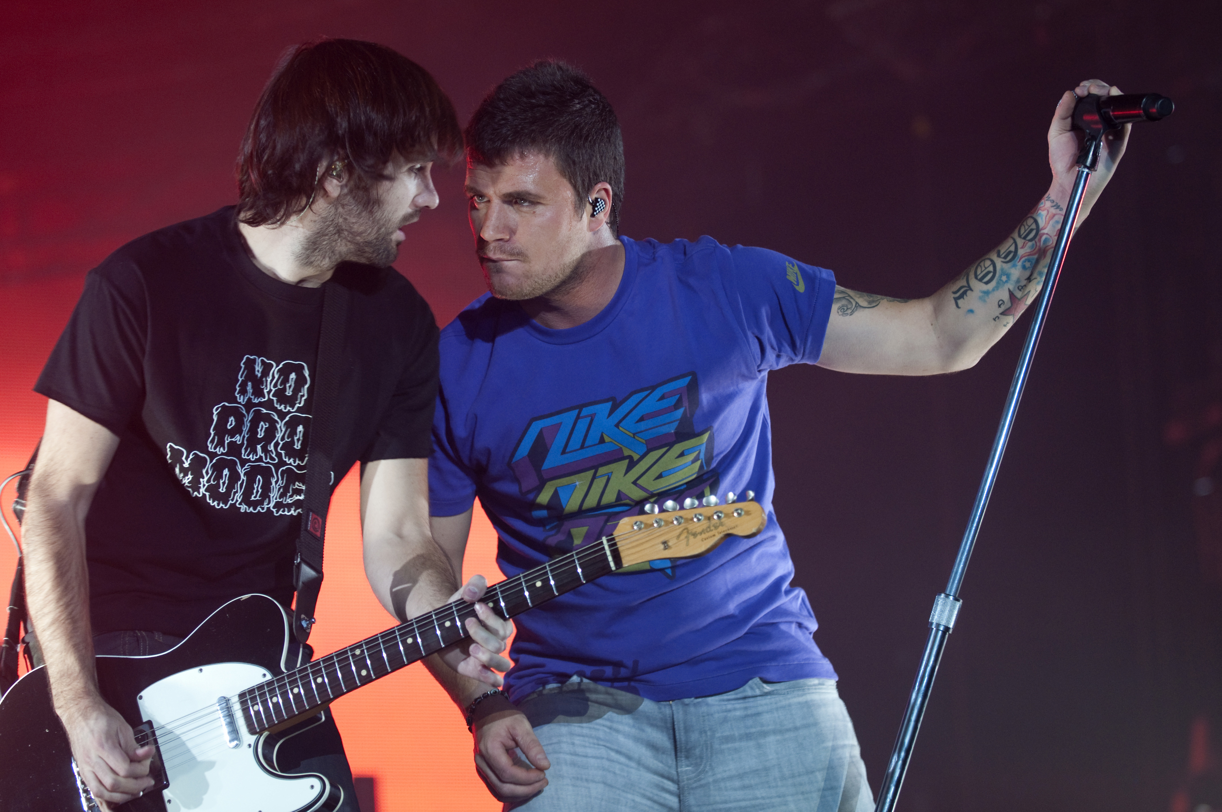 El Canto del Loco